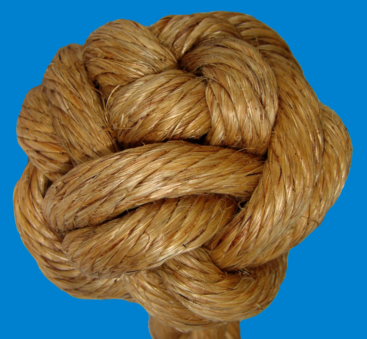 Seitenansicht des Rosenknotens